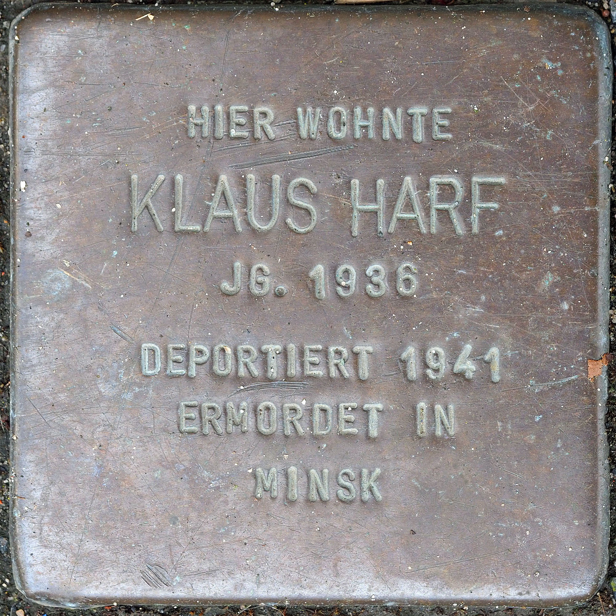 Stolpersteine MG: Harf, Klaus